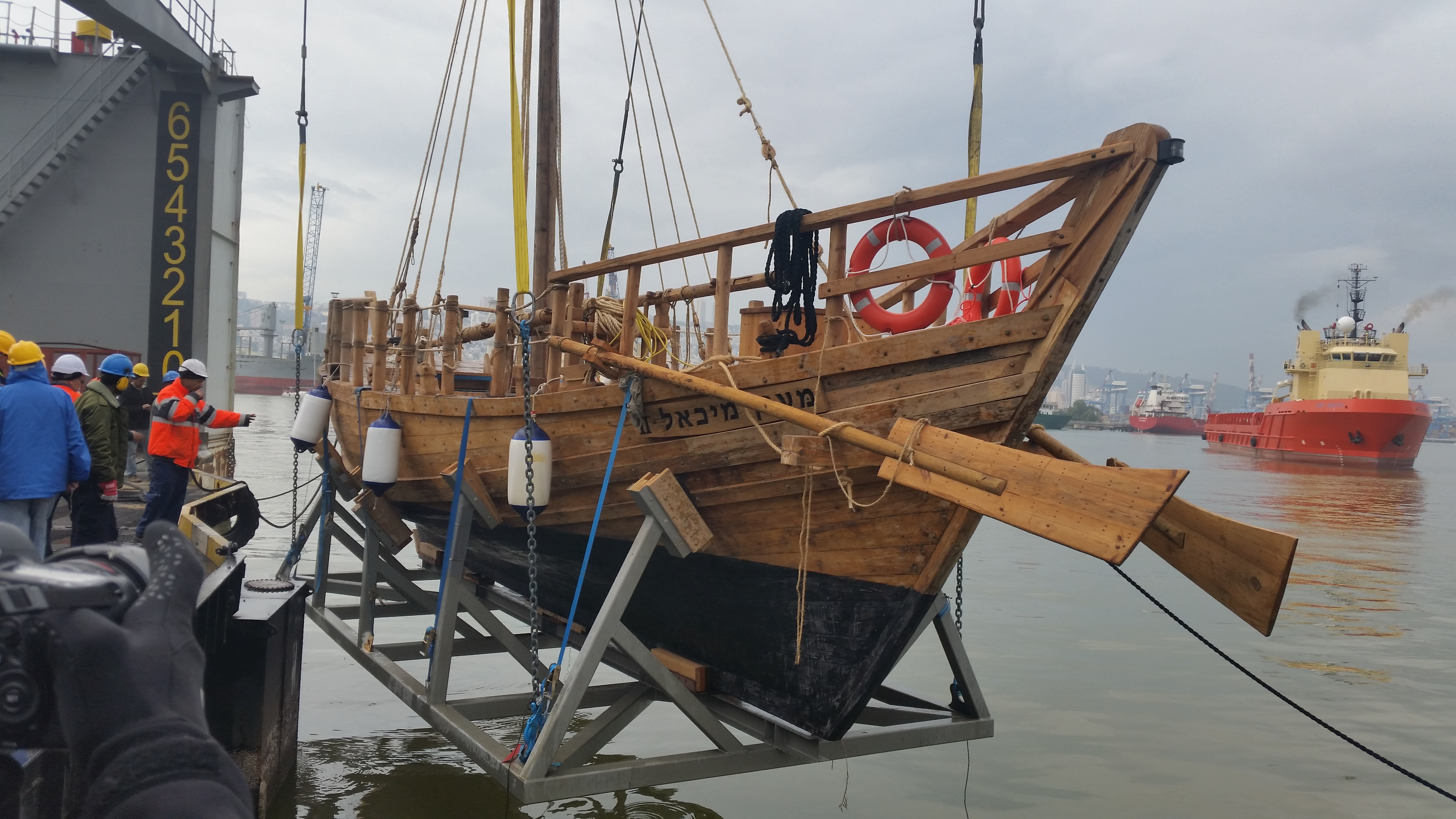 הורדת הספינה למים בספנות ישראל